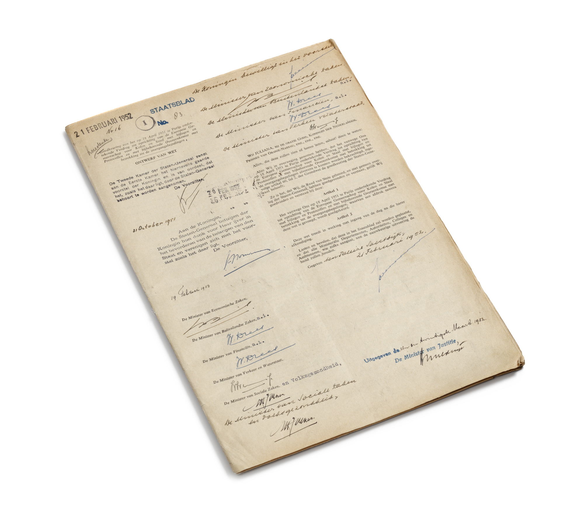 Nederlandse wet tot goedkeuring van het oprichtingsverdrag van de Europese gemeenschap van kolen en staal, Kabinet der Koningin - periode 1946-1985, inventarisnummer 10123